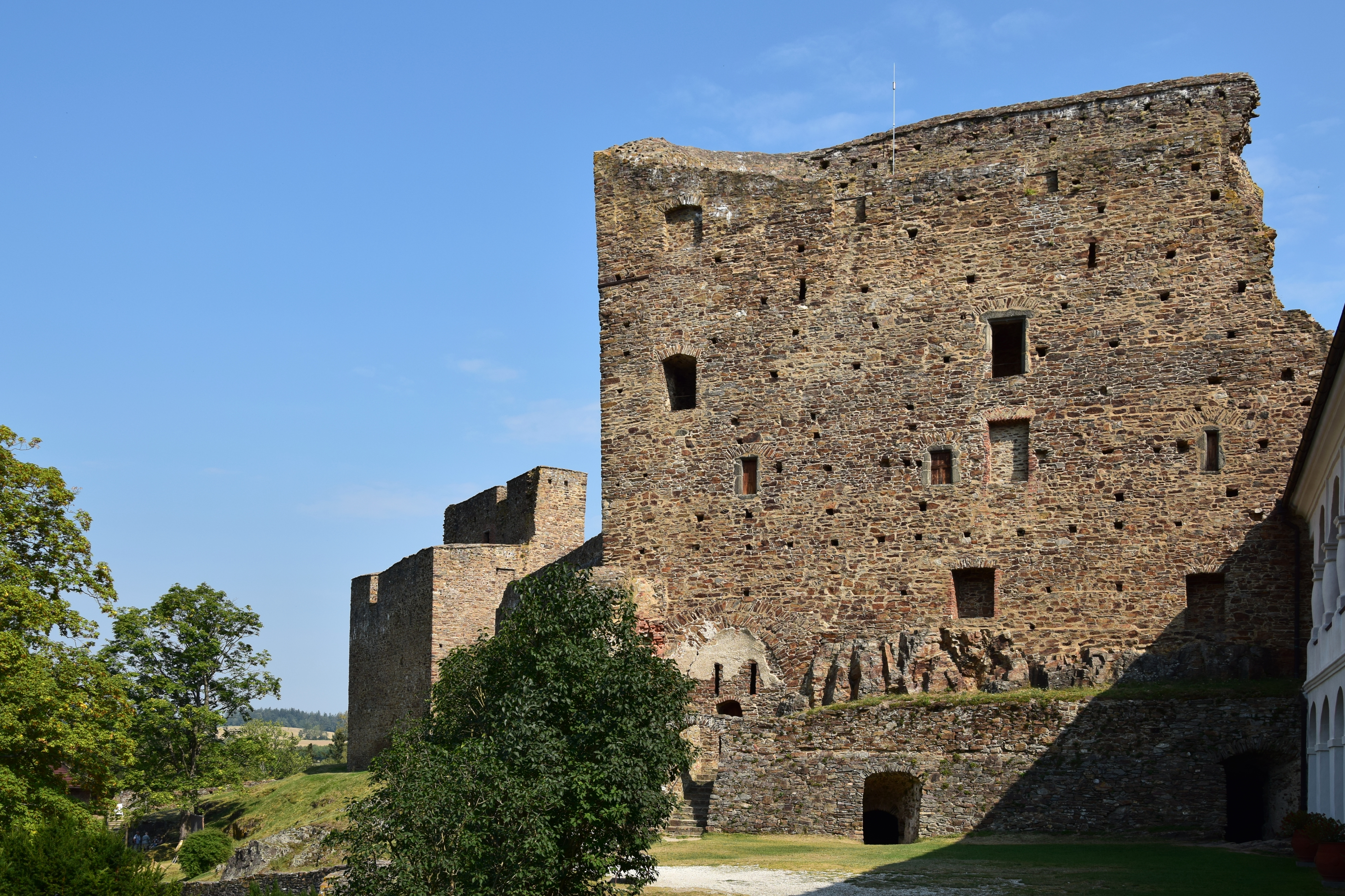 Velhartice – nádvorní strana Rajského domu